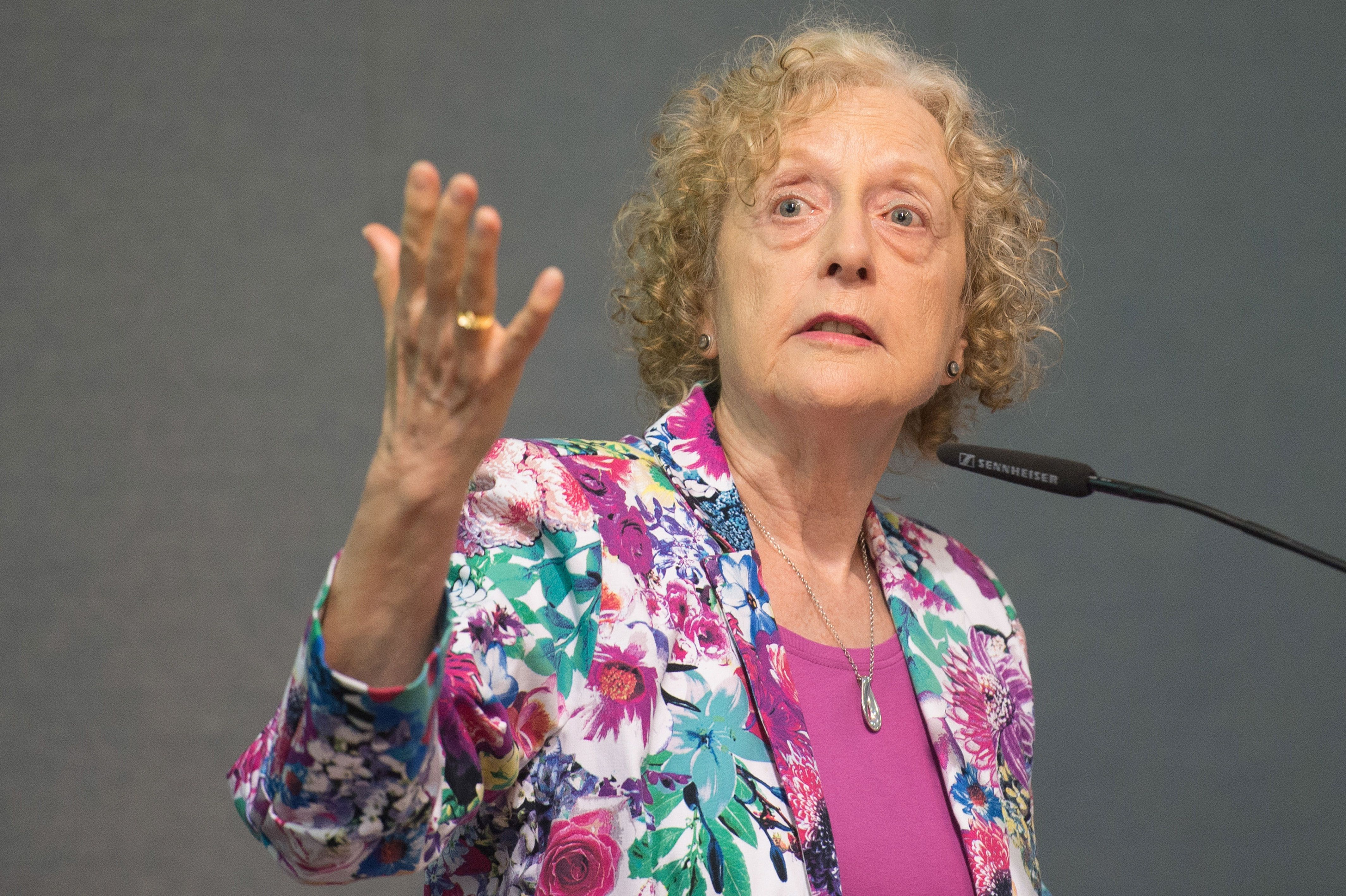 A teórica feminista Carole Pateman, reconhecida mundialmente pela produção acadêmica no campo da Participação e Teoria Democrática, durante o painel Pequim+20: Mais Mulheres na Política